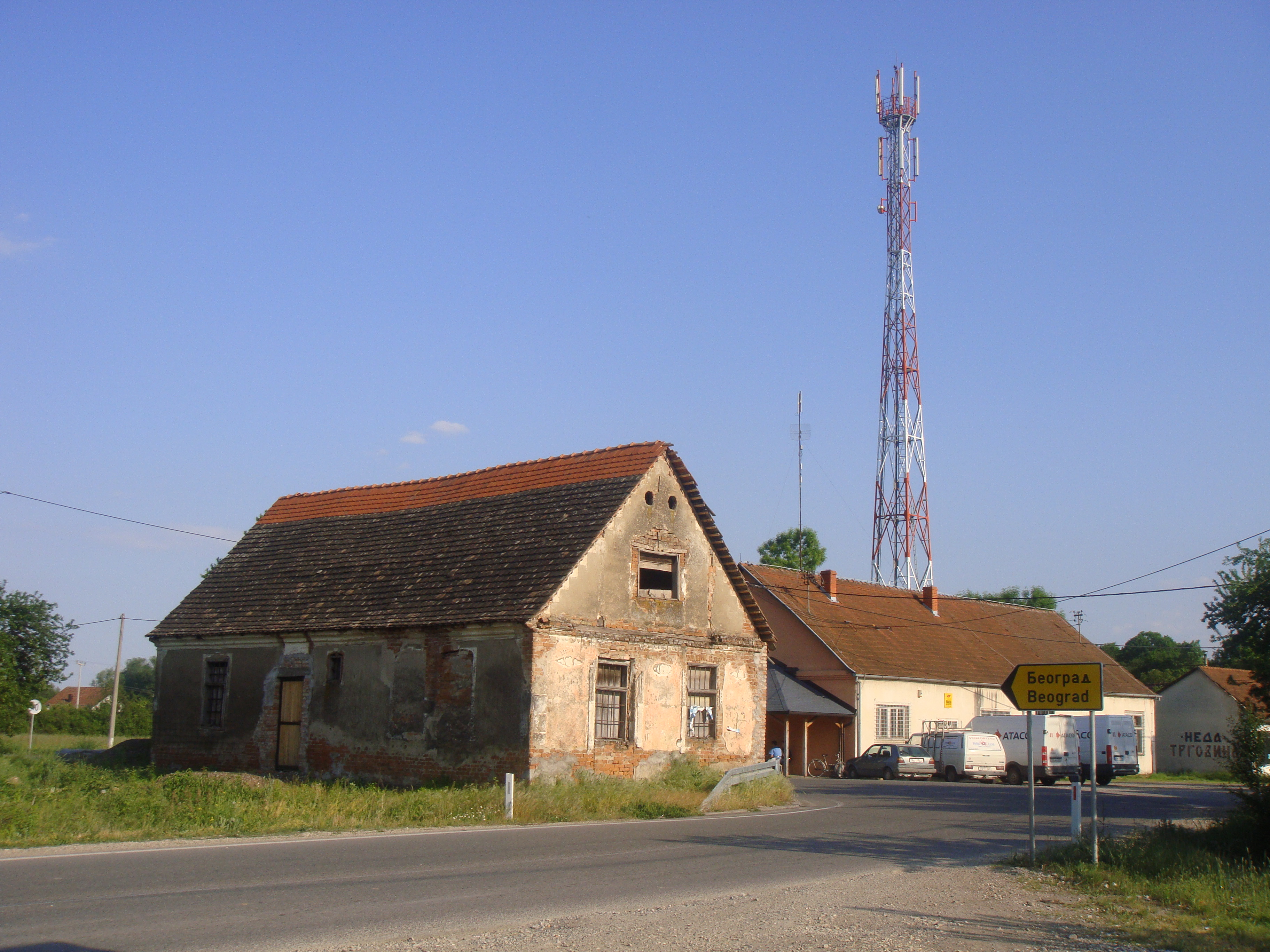 Donja Slatina, Bosnia and Herzegovina